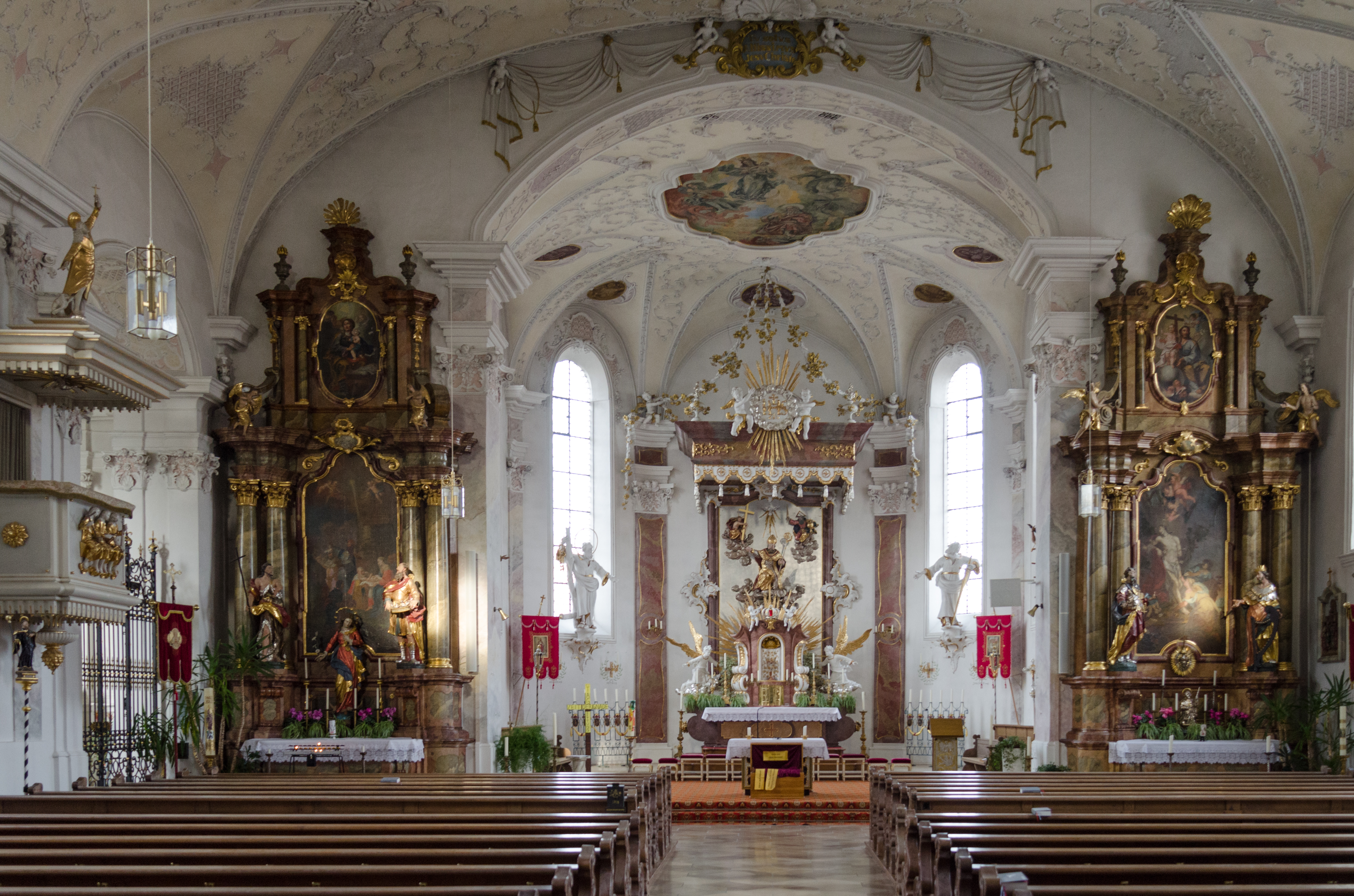 Gundelfingen, Katholische Stadtpfarrkirche St. Martin